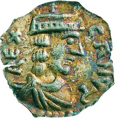 Knud 5. Magnussen. Ensidig præget sølvmønt med reliefportræt af Knud 5. og den latinske indskrift CANUT REX. Mønten viser en skægløs, langhåret mand med et kronelignende diadem, formodentlig et ideali